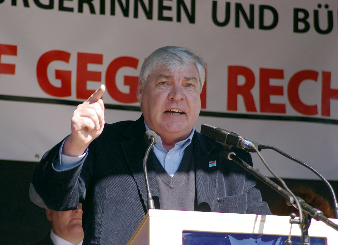 Michael Sommer, seit dem 28. Mai 2002 Bundesvorsitzender des Deutschen Gewerkschaftsbundes. Kundgebung am 1. Mai 2007 auf dem Platz der alten Synagoge in Dortmund